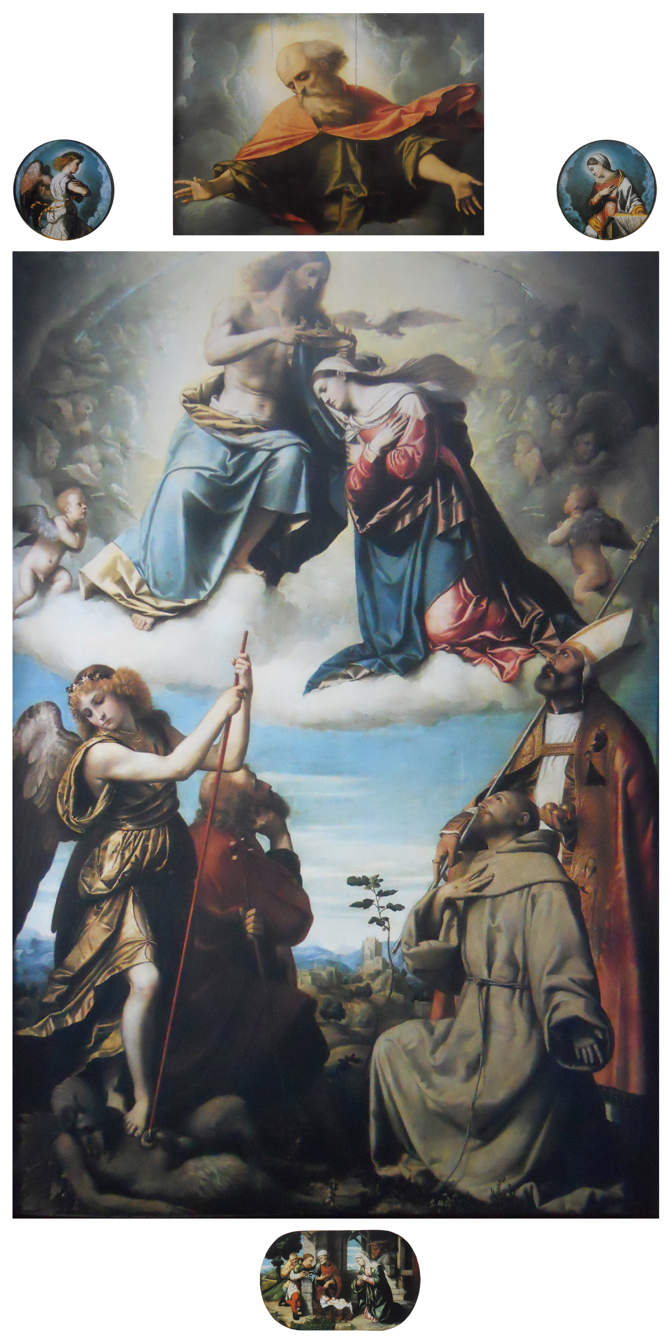 Polittico dell'incoronazione della vergine